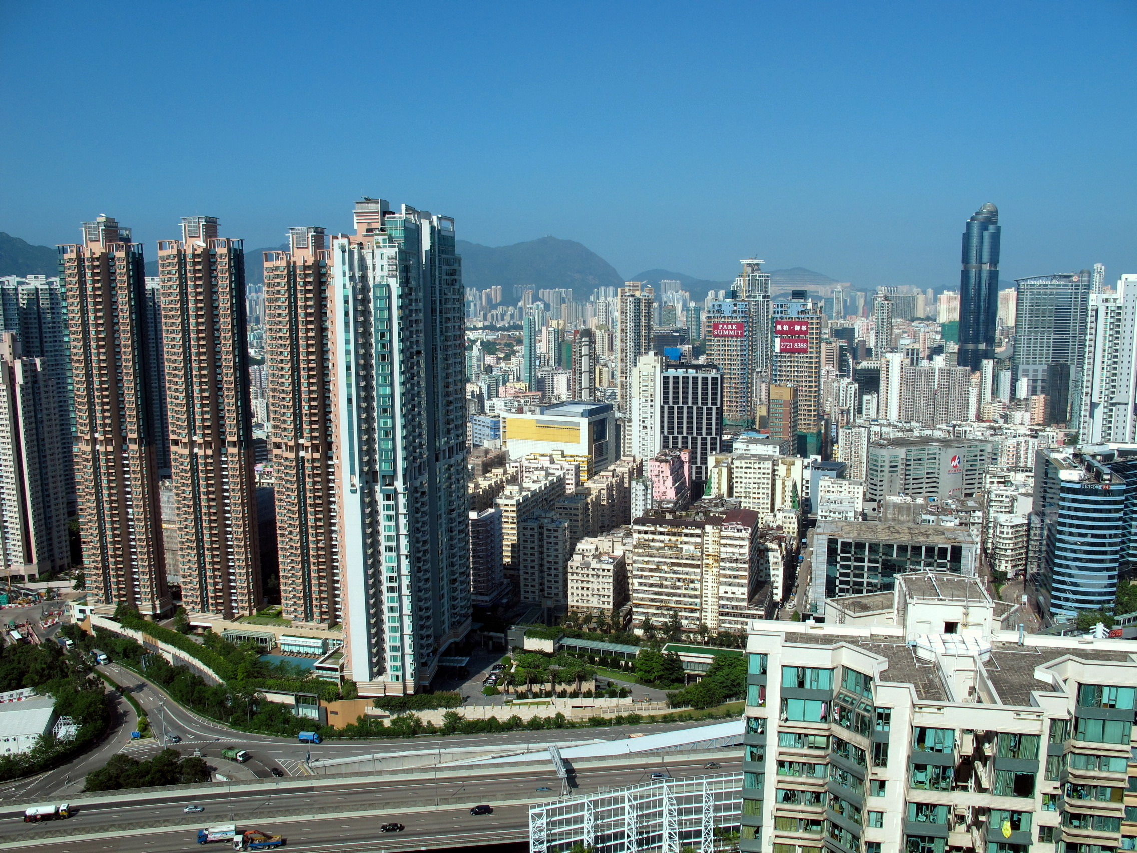 Tai Kok Tsui 大角咀